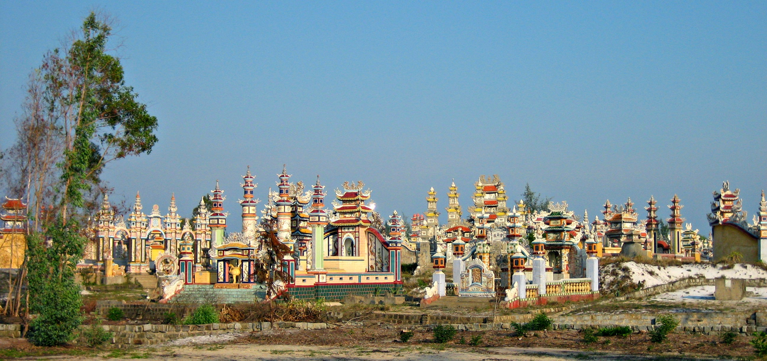 Quần thể nghĩa trang tại xã An Bằng, huyện Phú Vang, tỉnh Thừa Thiên - Huế.